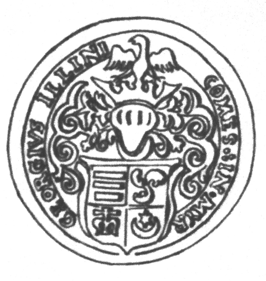 Пячатка Юрыя Іллініча малодшага, графа Мірскага, 1566 год